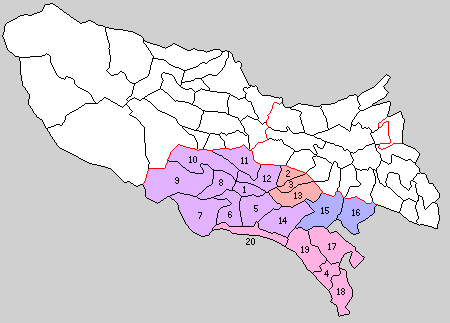 南多摩郡の町村。